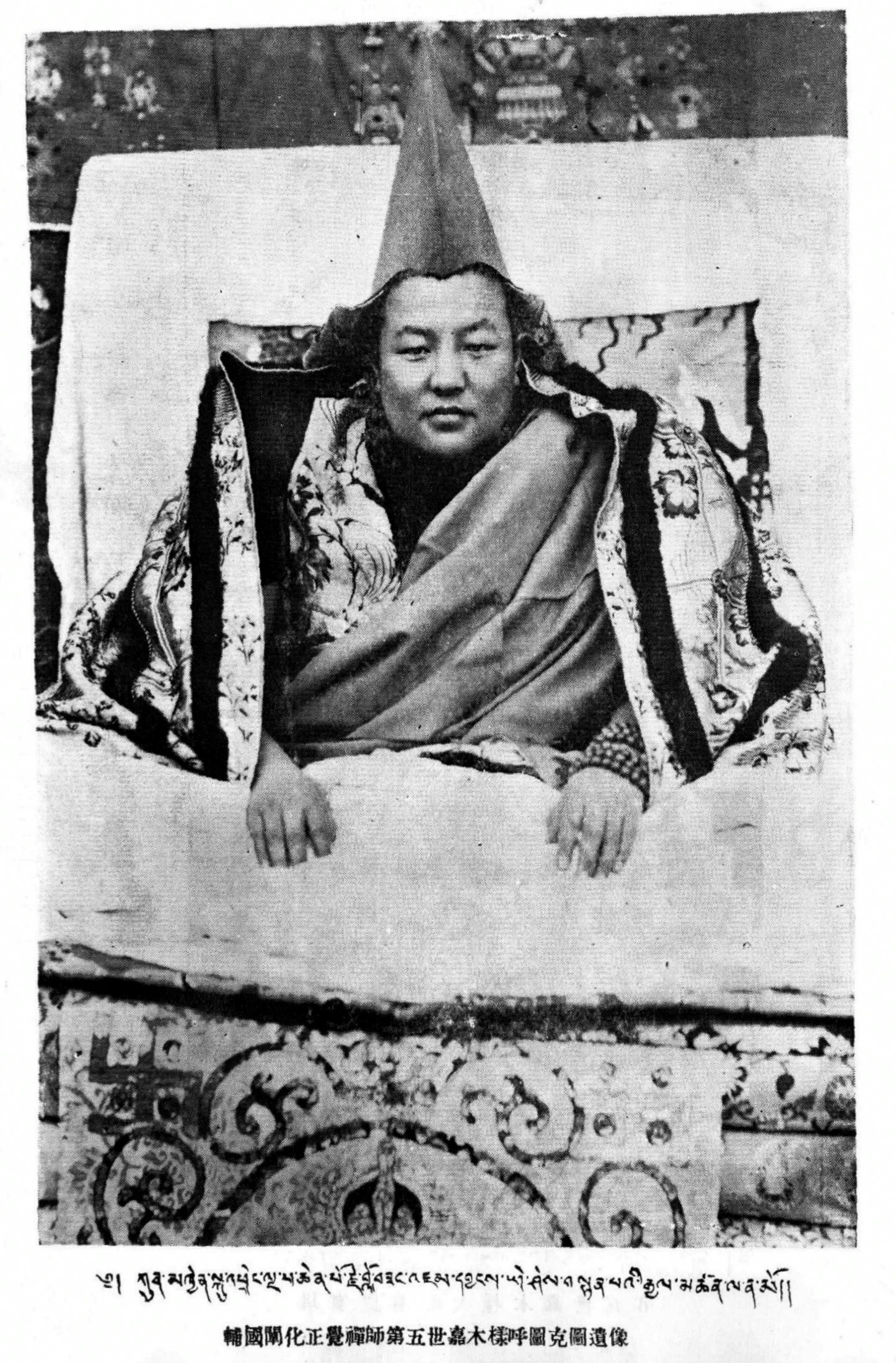 黃正光 嘉木樣